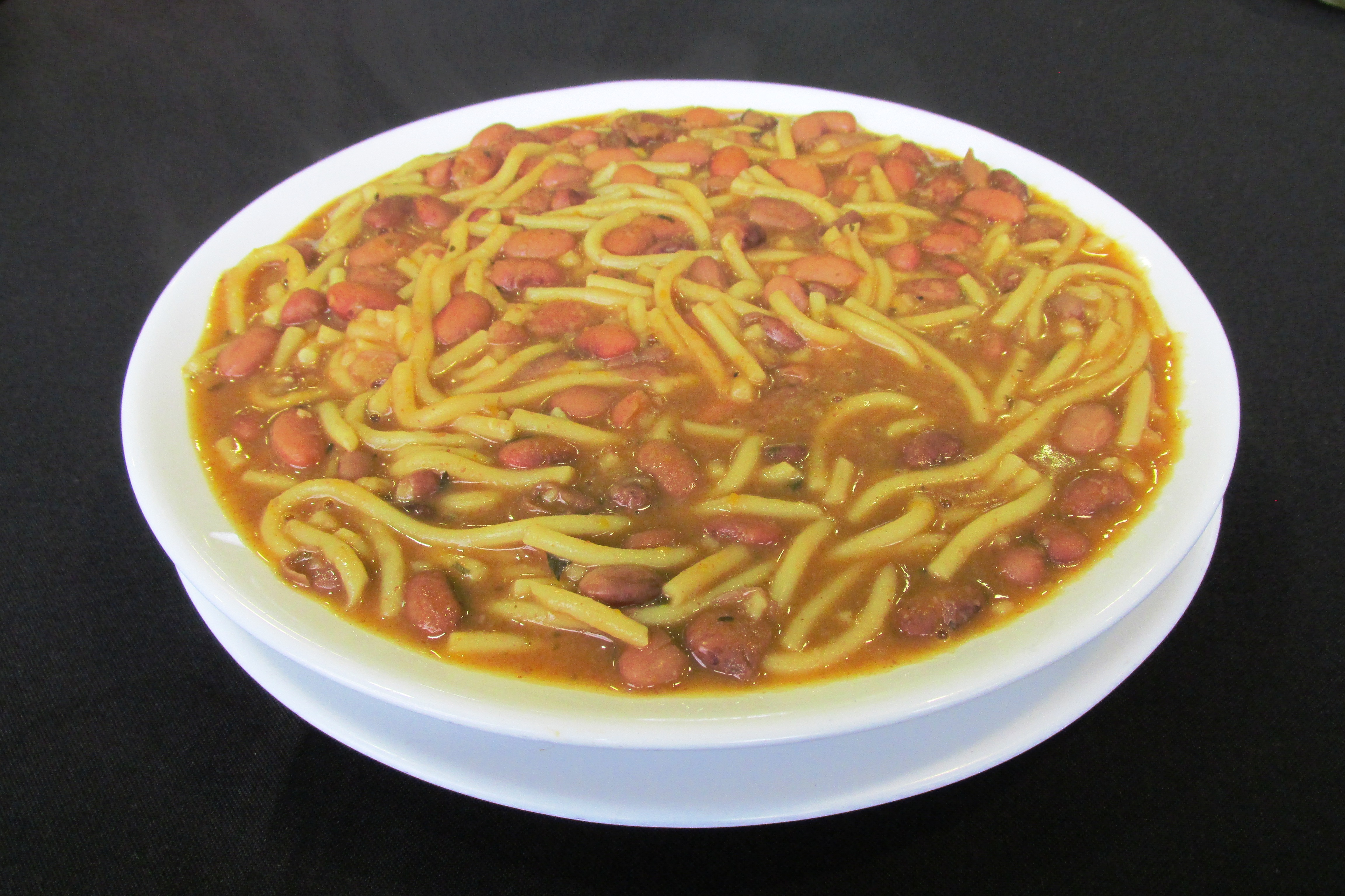 Porotos con rienda